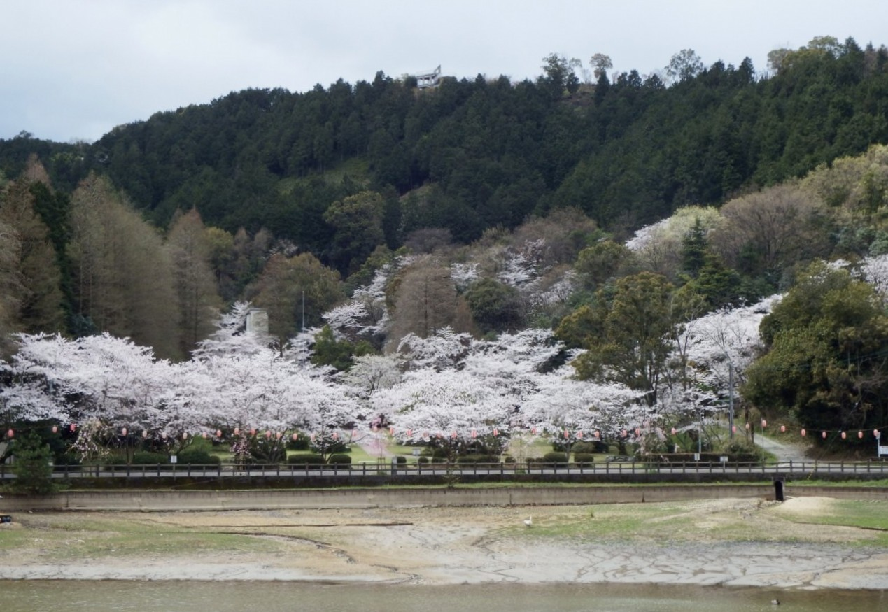 新居浜市の滝の宮公園